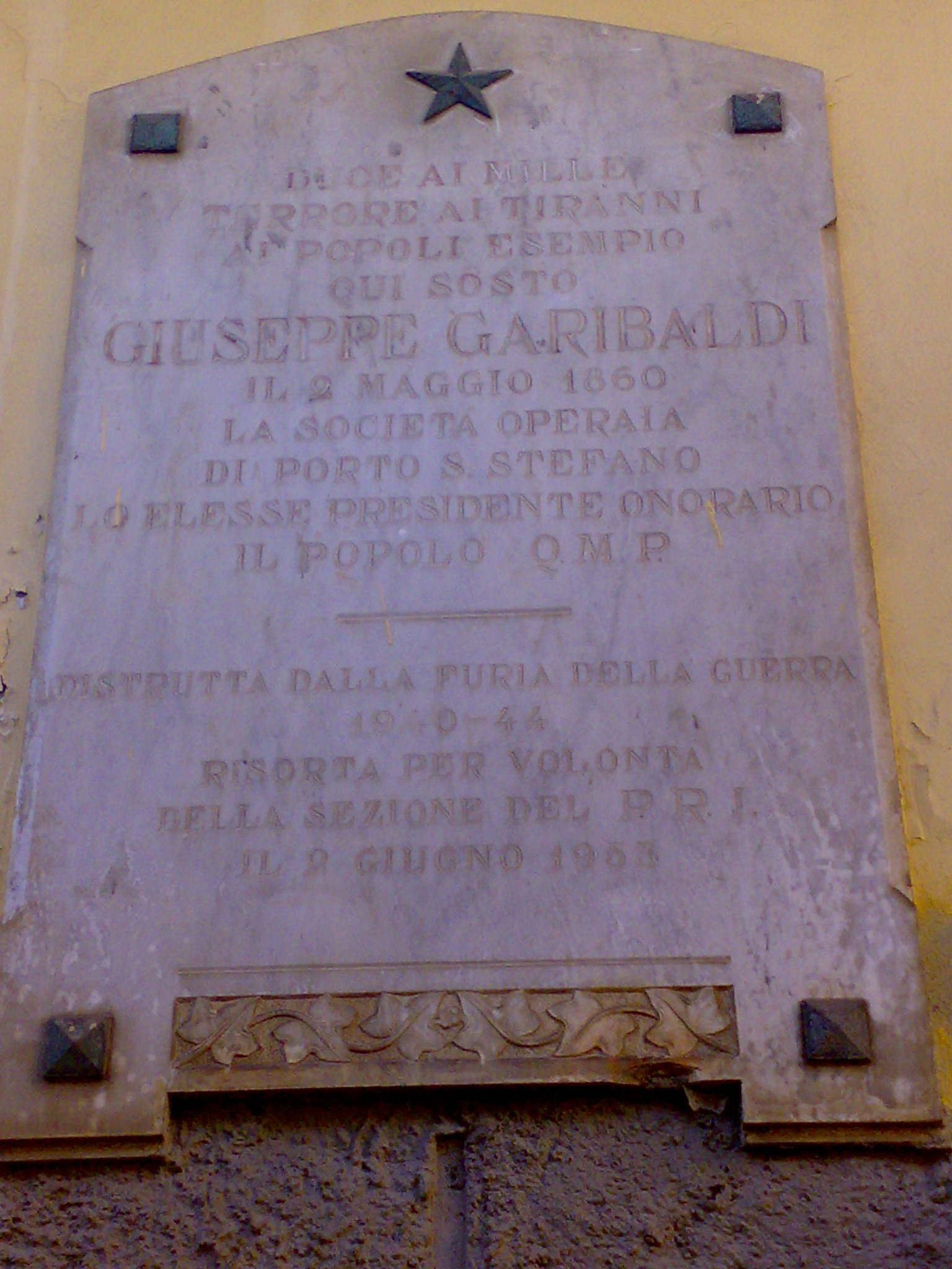 Targa che ricorda la sosta dei mille a Porto Santo Stefano il 9 Maggio 1860 durante il loro viaggio di trasferimento da Quarto a Marsala.